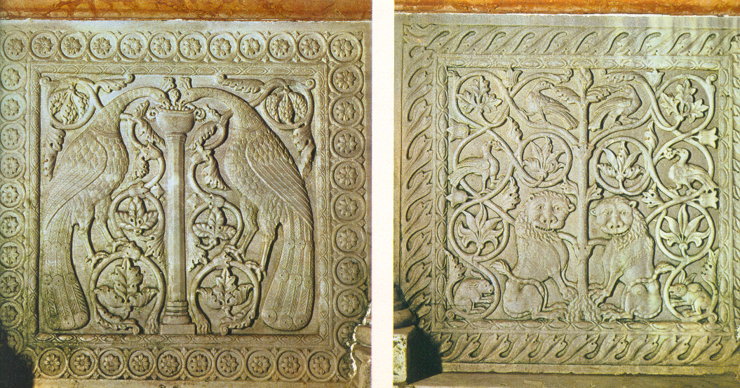 Torcello - Bas reliefs du coeur